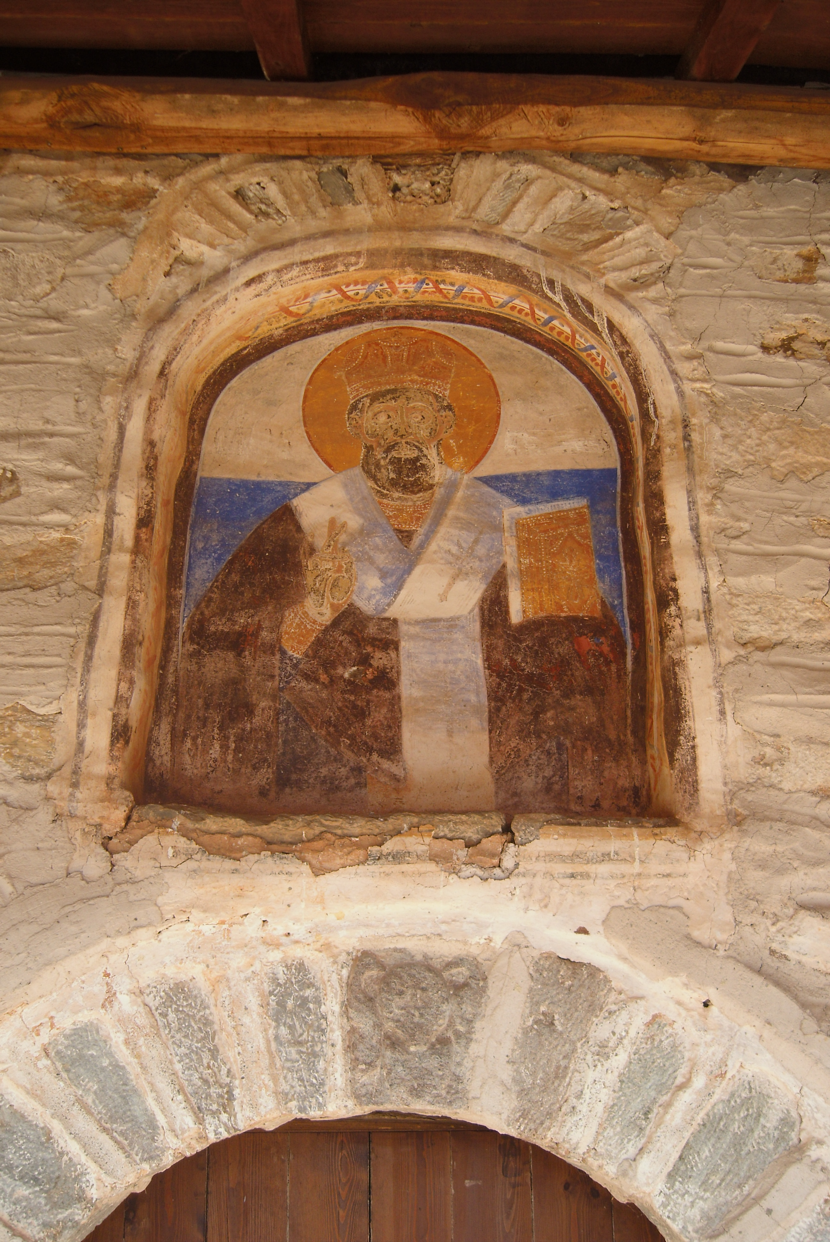 Входната икона на гробищната църква в Шестеово